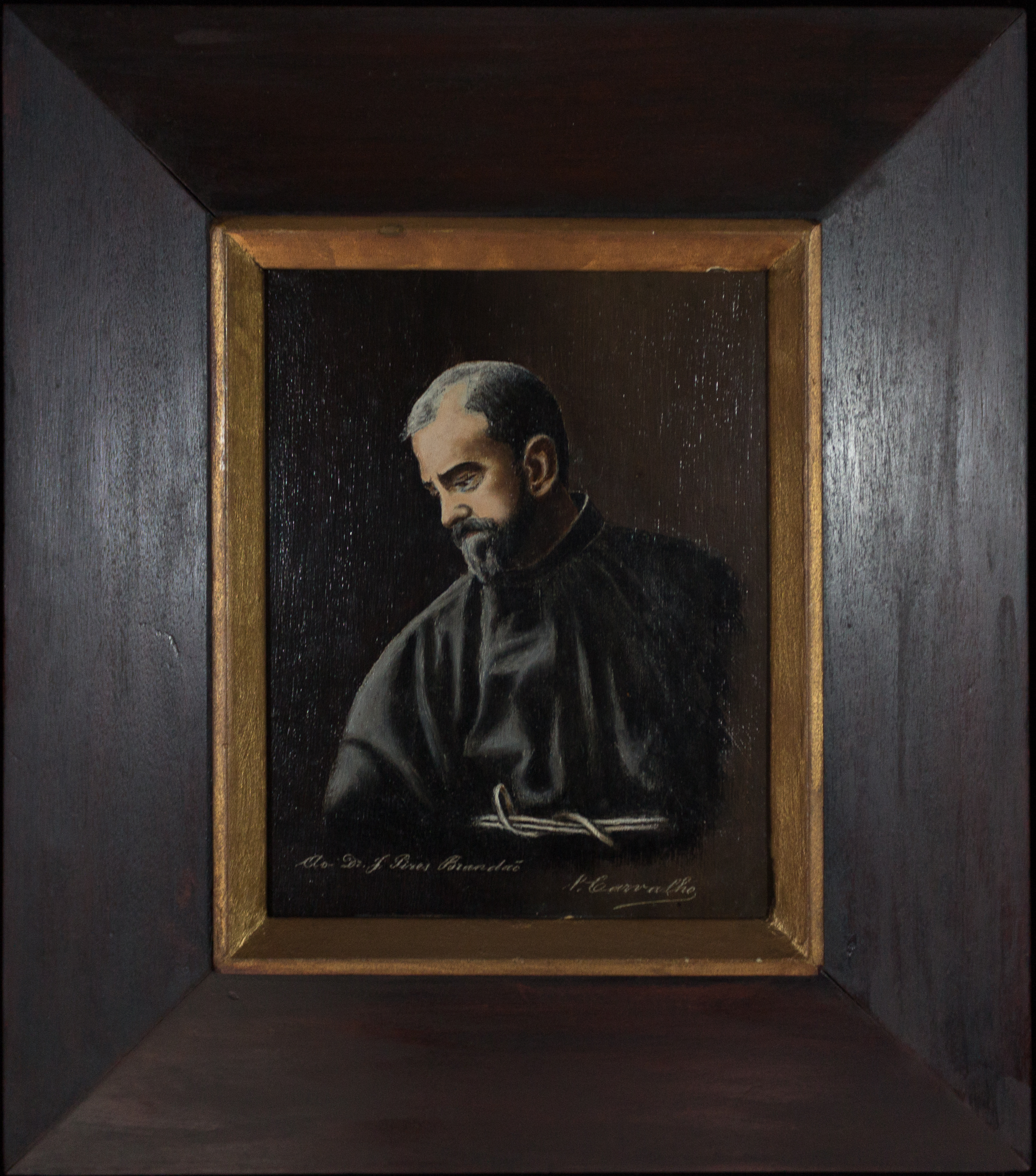 Obra da coleção Brasiliana Iconográfica.